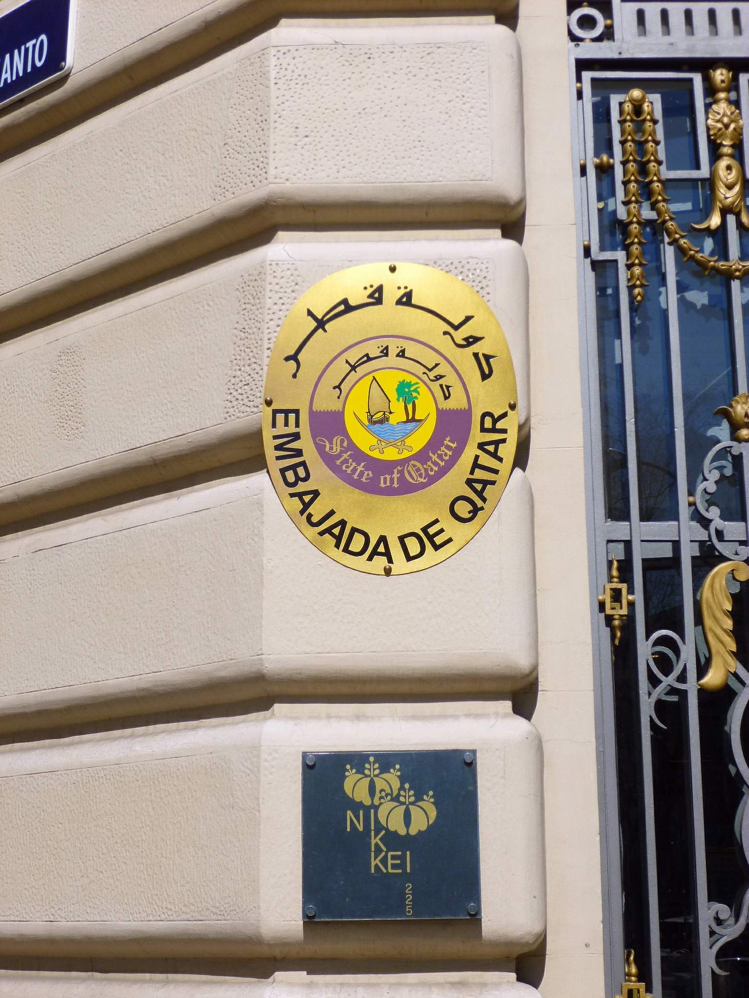 Embajada de Qatar en Madrid